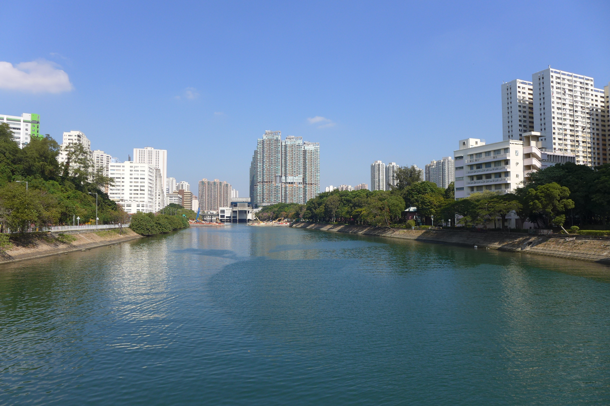 Tuen Mun River